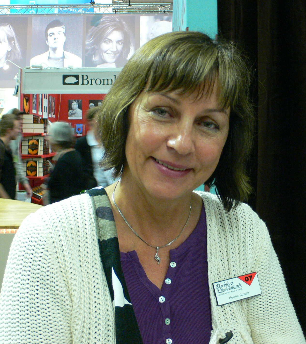 Helene Tursten at Gothenburg Book Fair 2007, Helene Tursten på Bok- och biblioteksmässan 2007